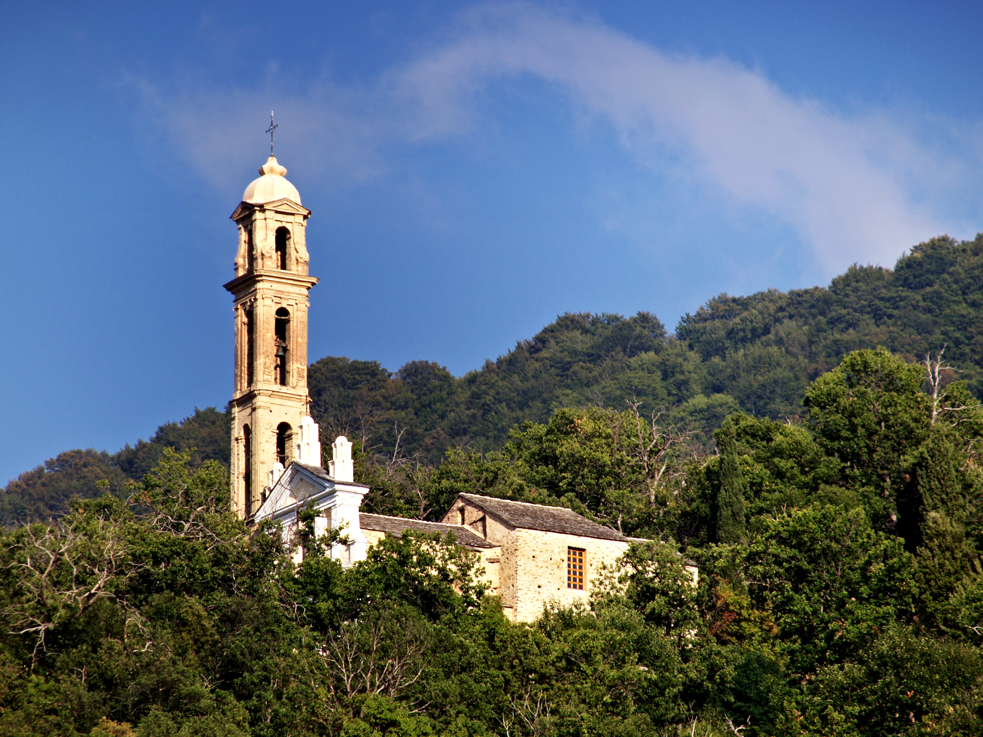 Sant'Andréa-di-Bozio (Corsica) - La "Cathédrale"